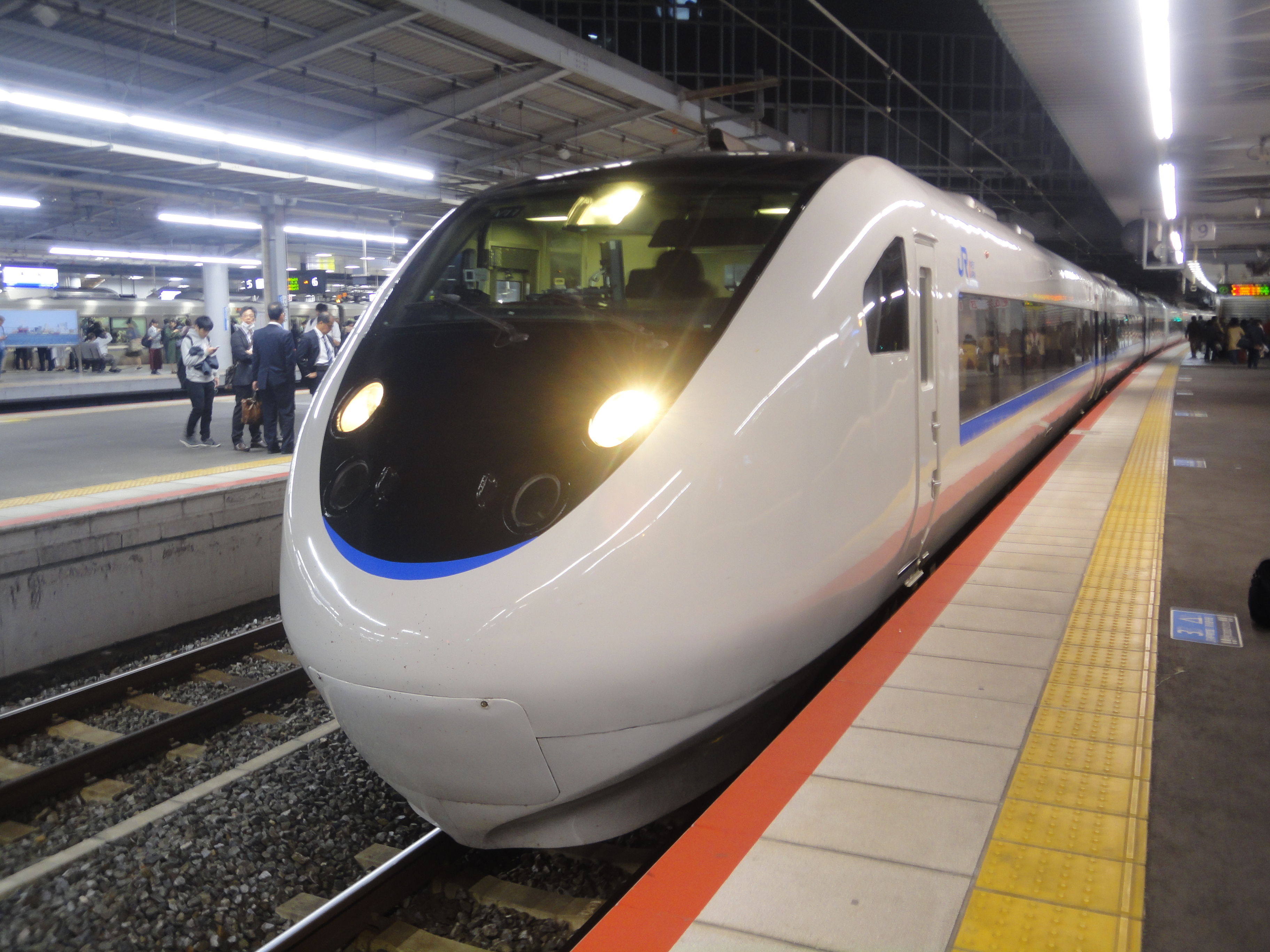 2018-10-30 新大阪駅にて